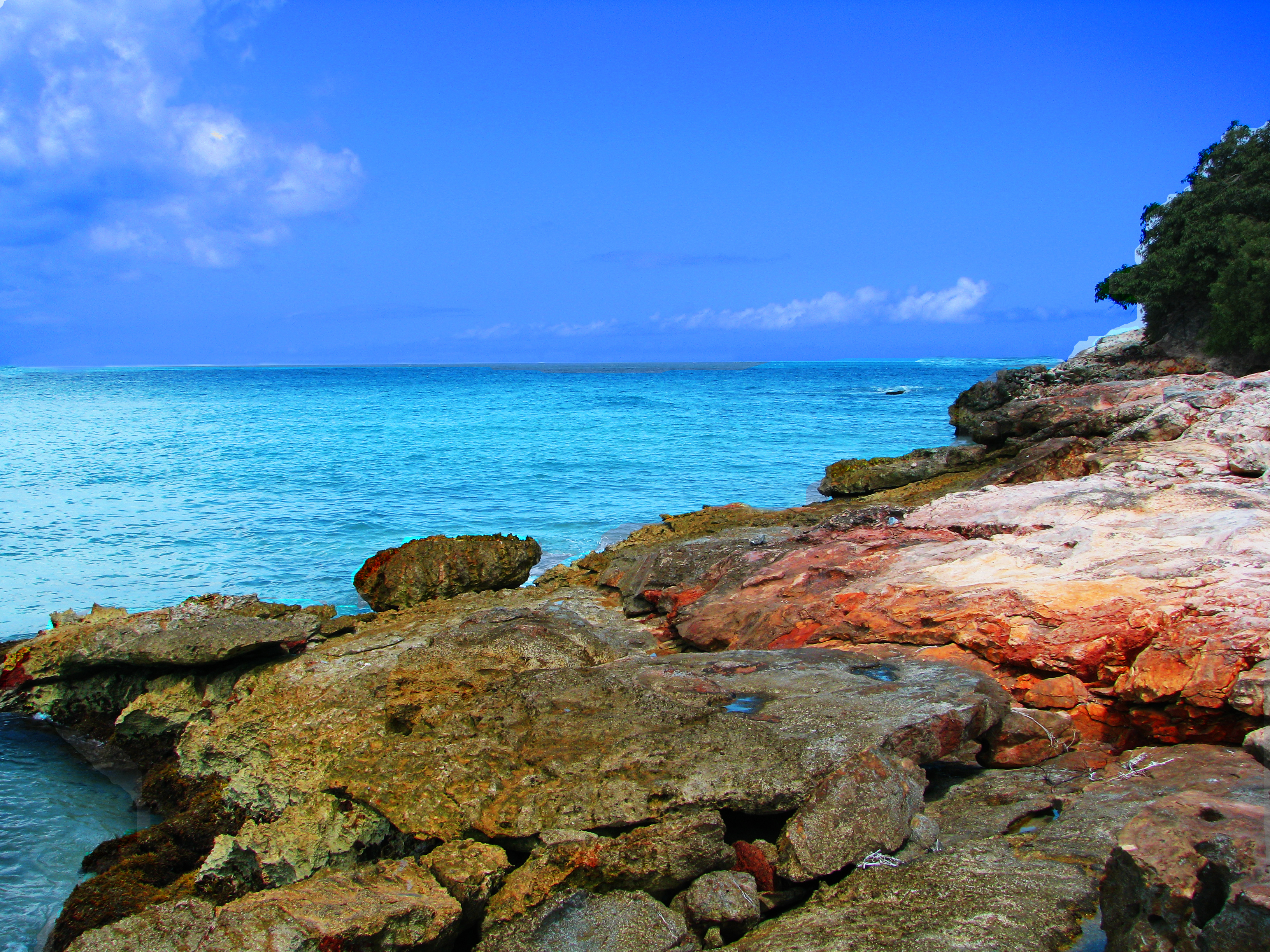 Baie Rouge on St. Maarten